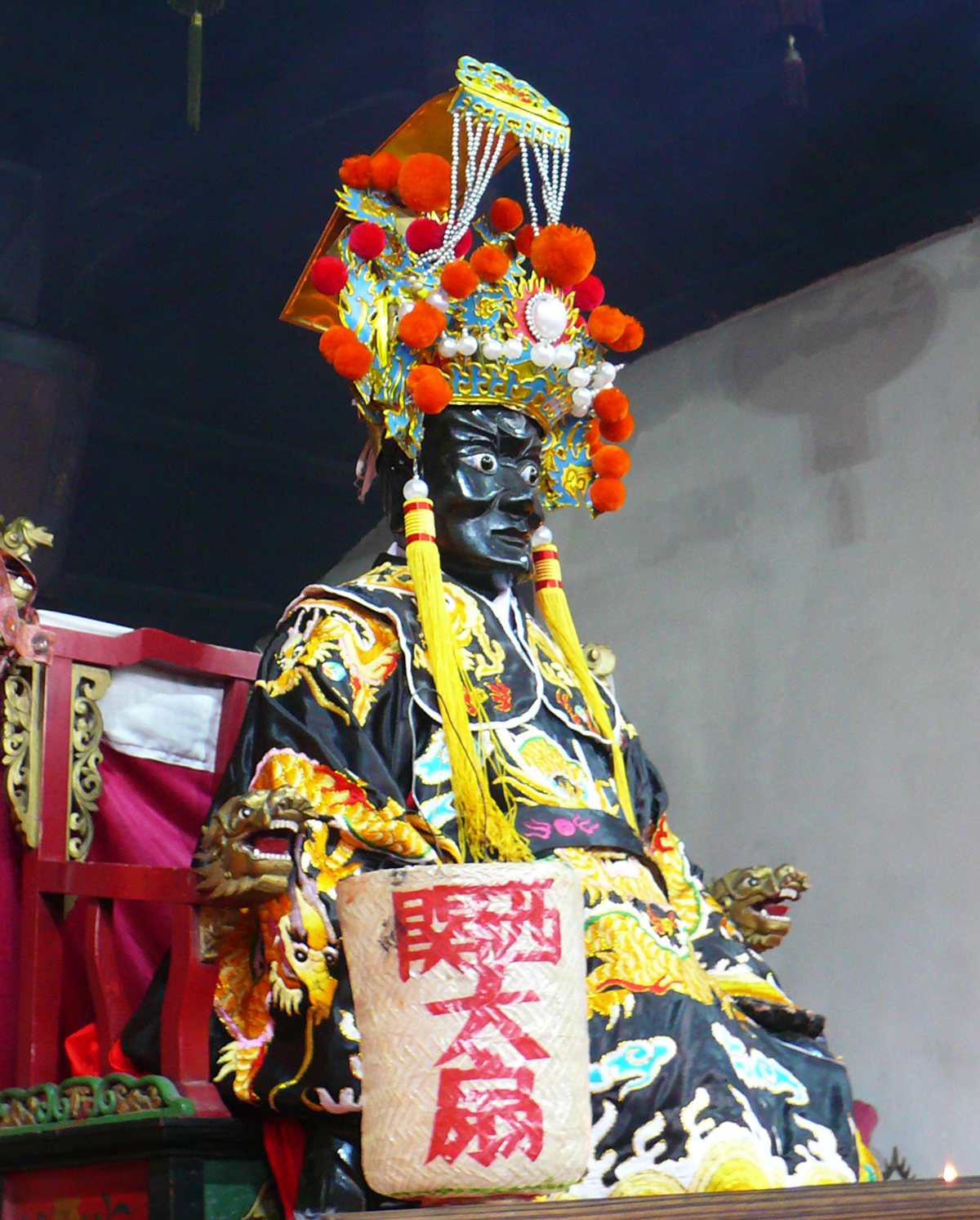 蒲城西晏公庙内晏公神像。关西大扇。